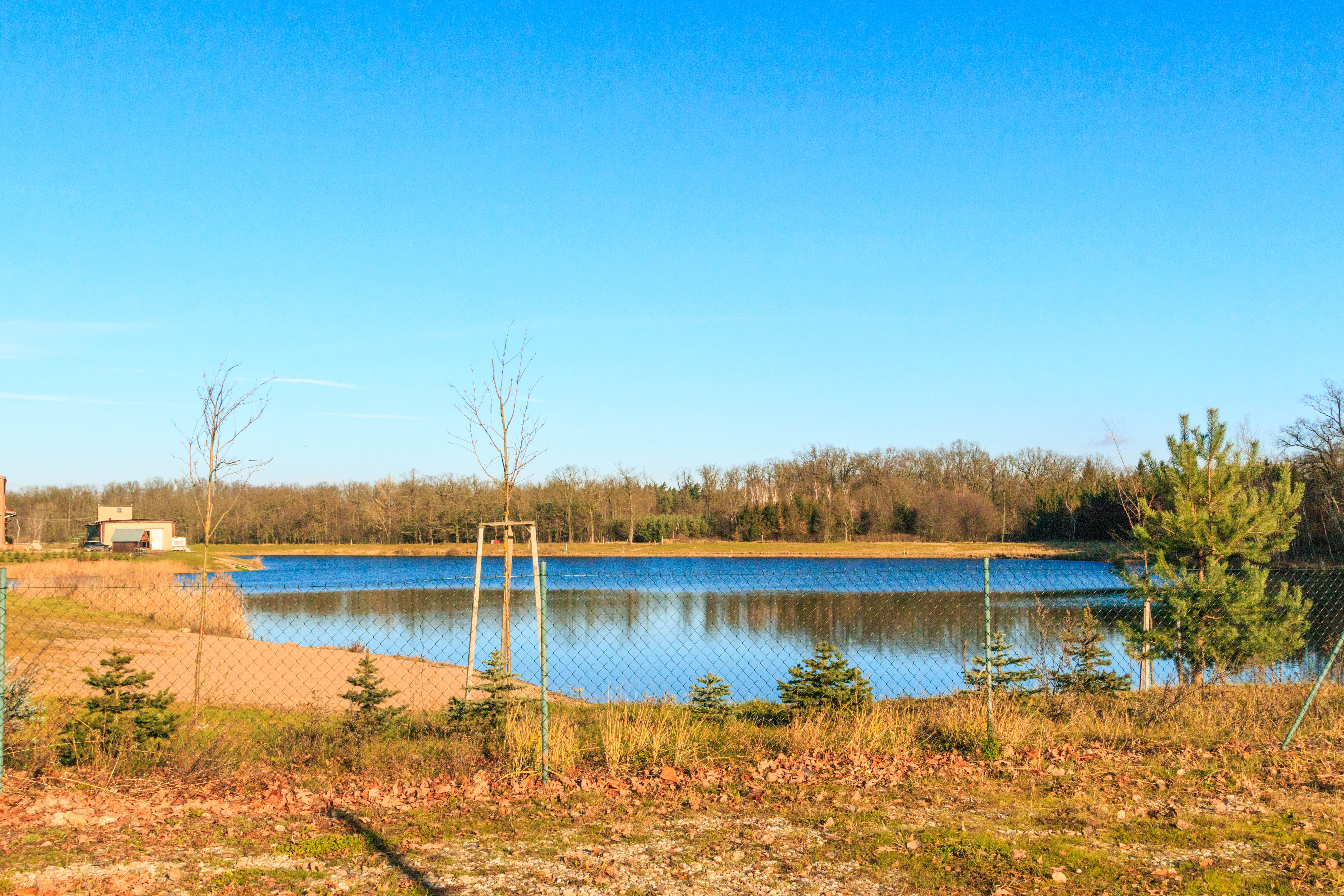 Písník Mácháč u Malé Čeperky Project: Vodstvo.